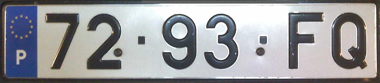 Portuguese 1992-1998 type license plate